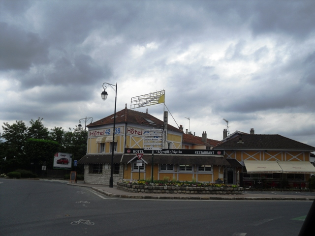 Le café-restaurant du Réveil matin à Montgeron (91), départ du premier Tour de France en 1903